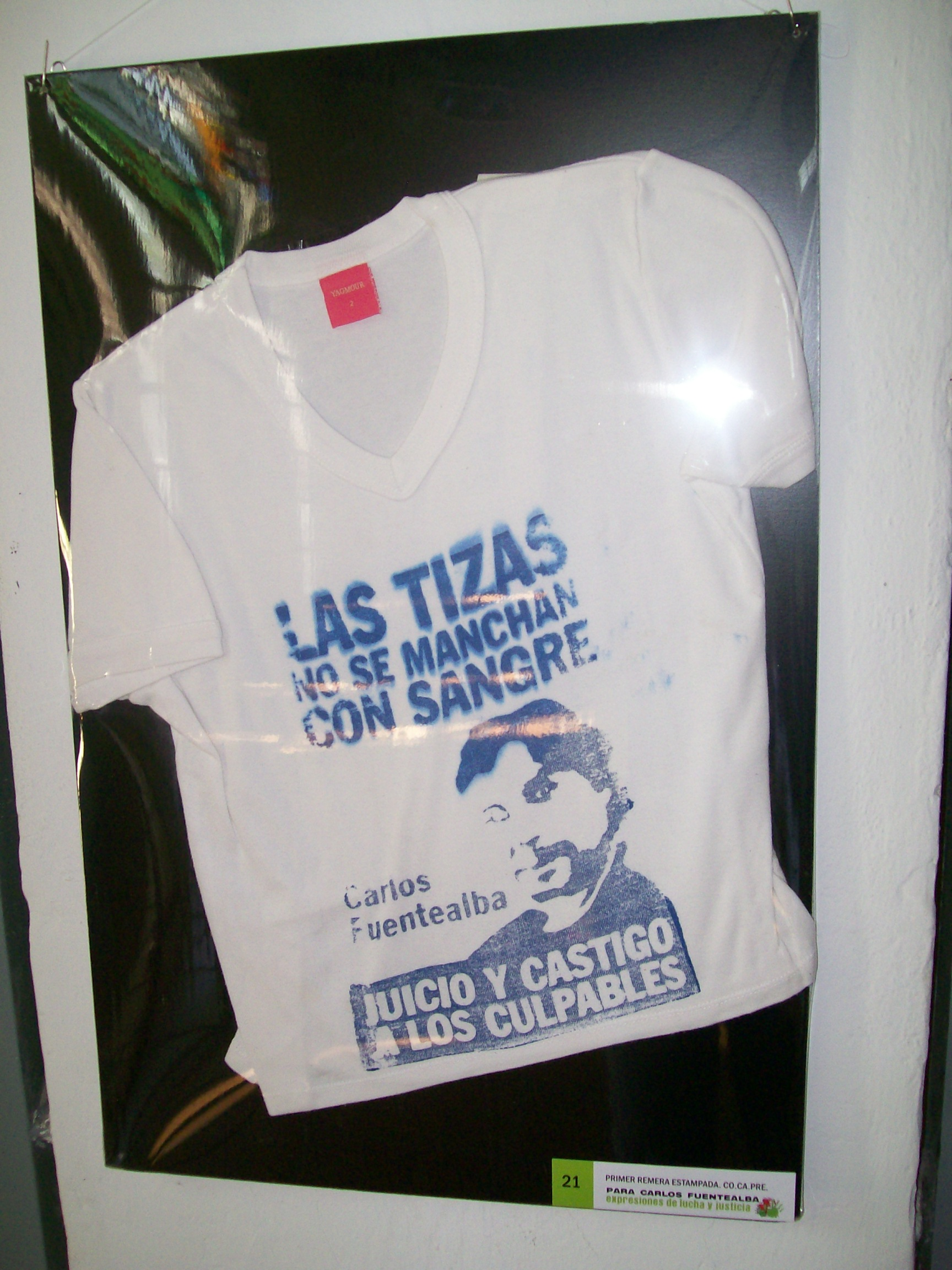 Remera con la cara del maestro asesinado en Neuquén Carlos Fuentealba